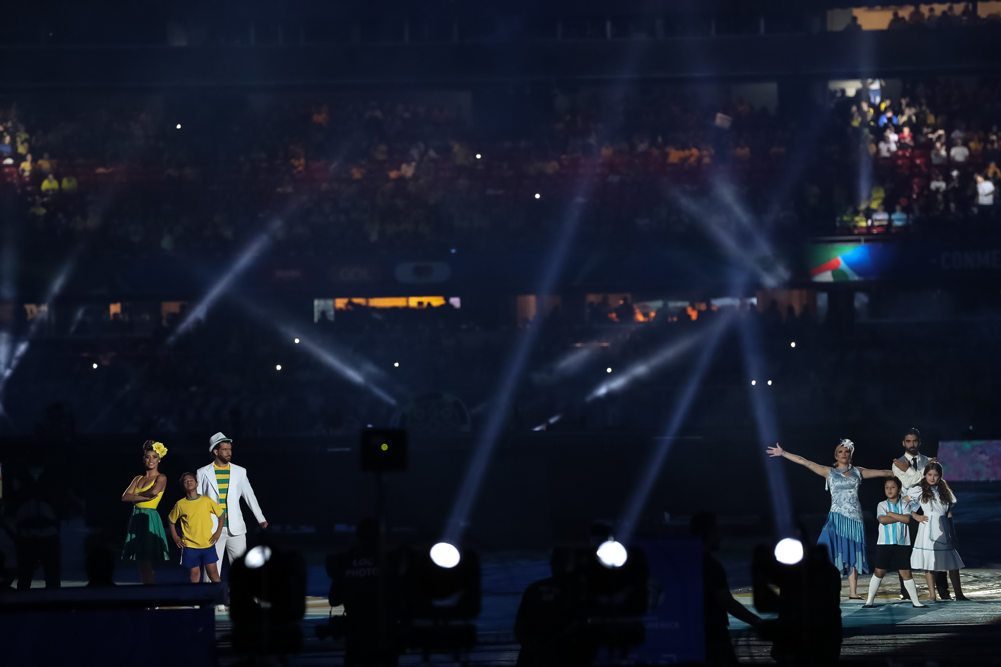 (São Paulo - SP, 14/06/2019) Presidente da República, Jair Bolsonaro durante Abertura da Copa América Brasil 2019. Foto: Marcos Corrêa/PR